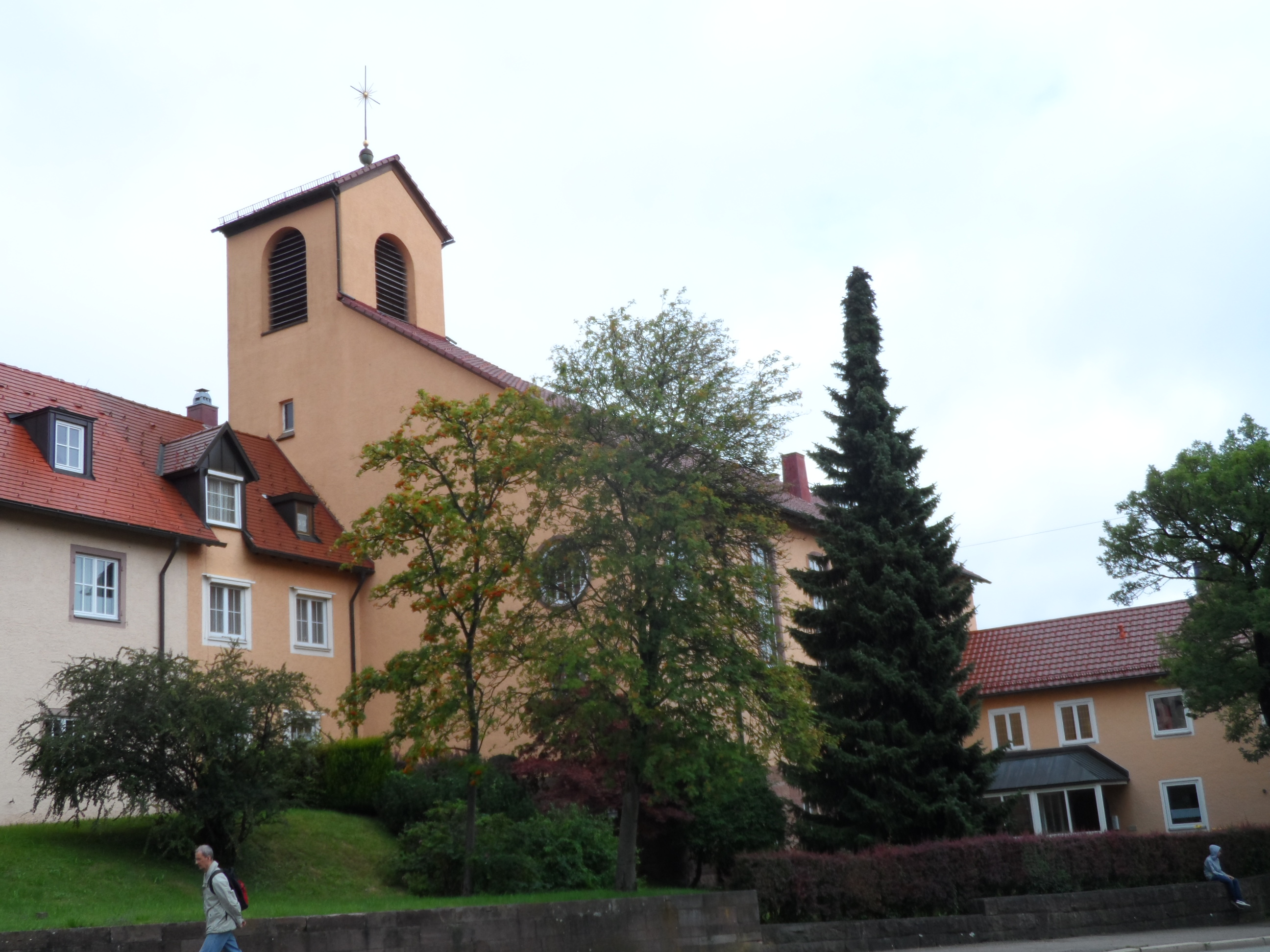 Evangelisch-methodistische Friedenskirche Freudenstadt